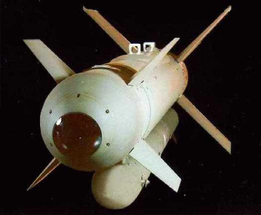 AGM-130 Missile